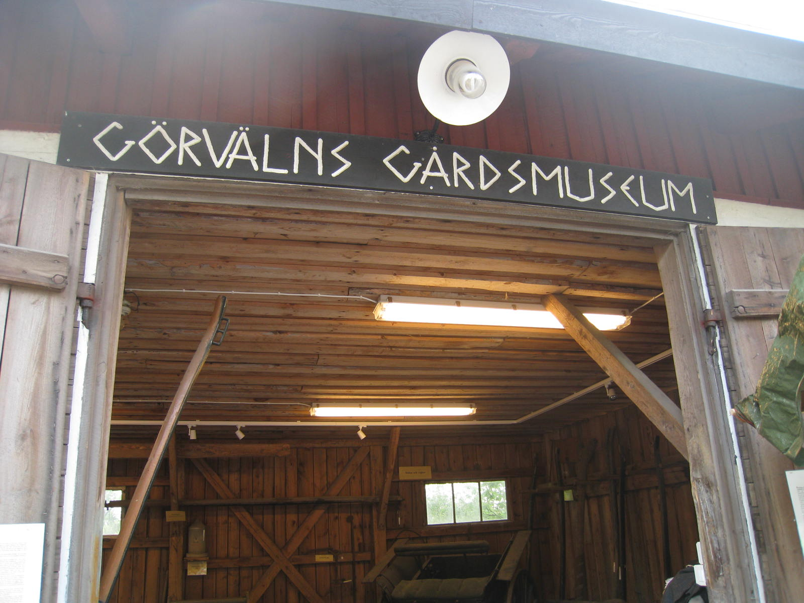 Görvälndagen är en hembygdsdag som arrangeras årligen av Järfälla hembygdsförening och Järfälla kommun tillsammans vid Görvälns slott i Järfälla kommun. Görvälns gårdsmuseum är inrymt i "Finvagnslidret" vid Görvälns slott.